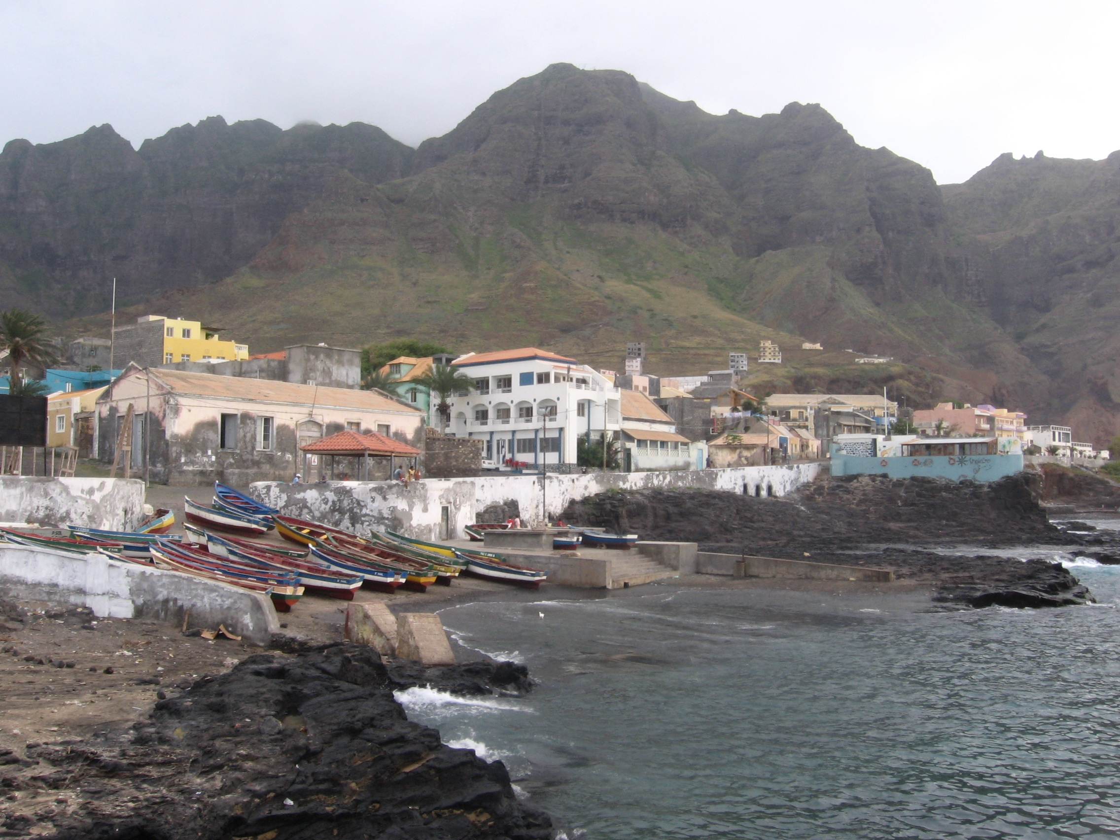 Vista geral da Ponta do Sol a partir do porto, Santo Antão, Cabo Verde